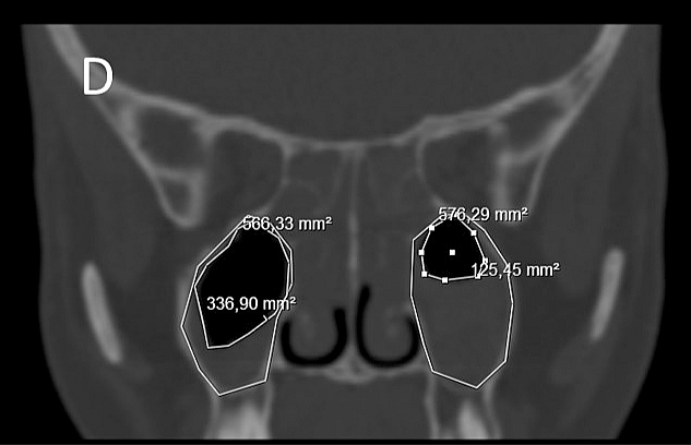 D) Área del contorno sinusal, área desocupada y área afectada en el plano frontal.